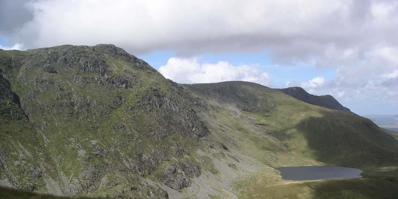 Aran Fawddwy